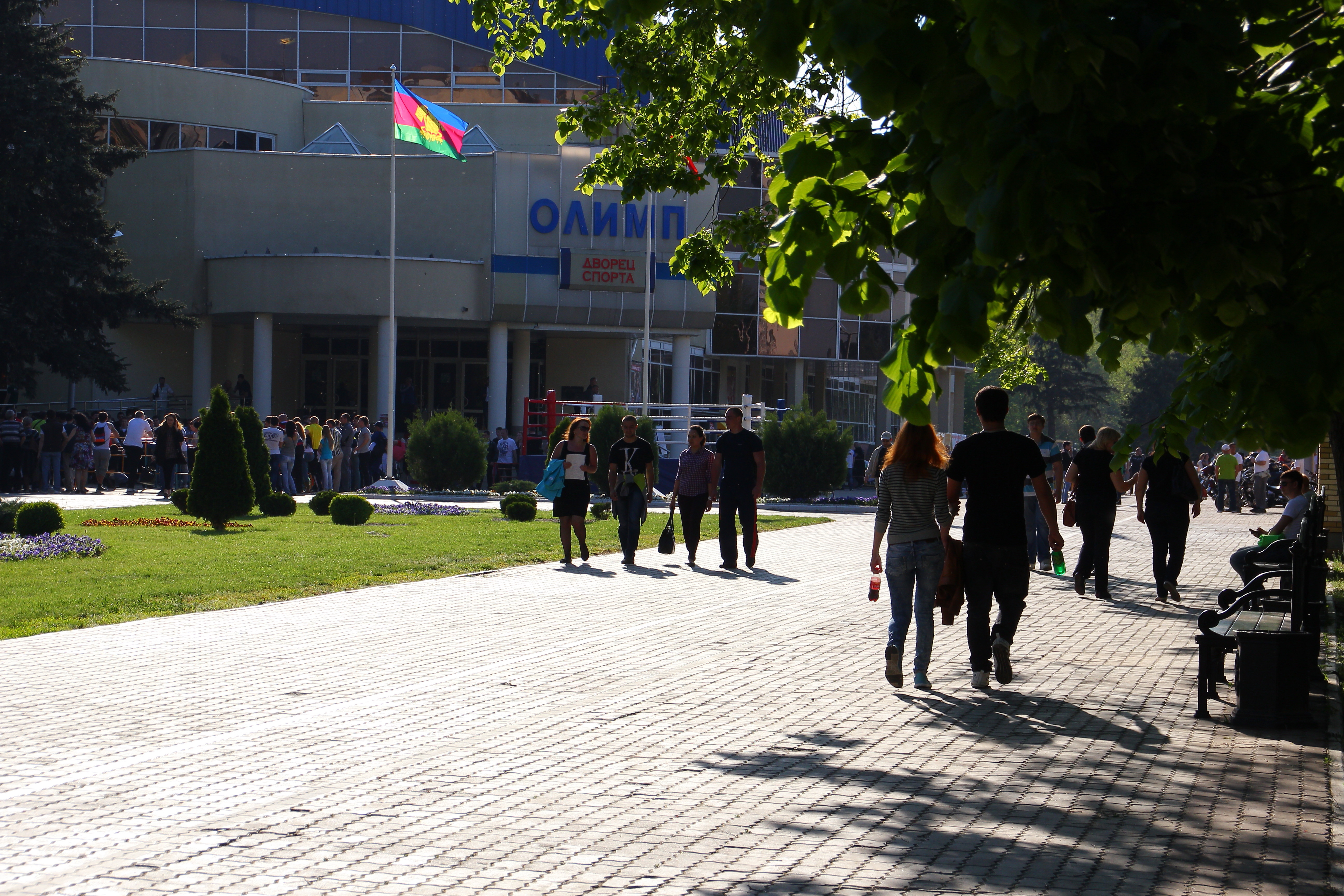 Краснодар, Дворец спорта "Олимп"